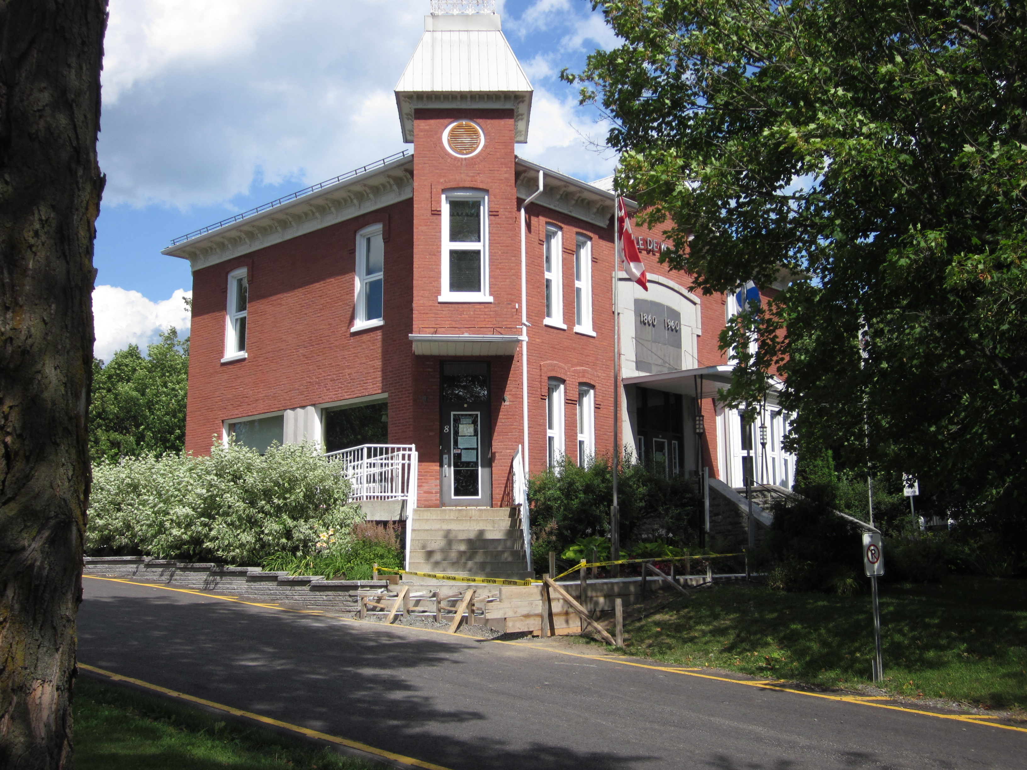 Hôtel de ville de Warwick (Québec)